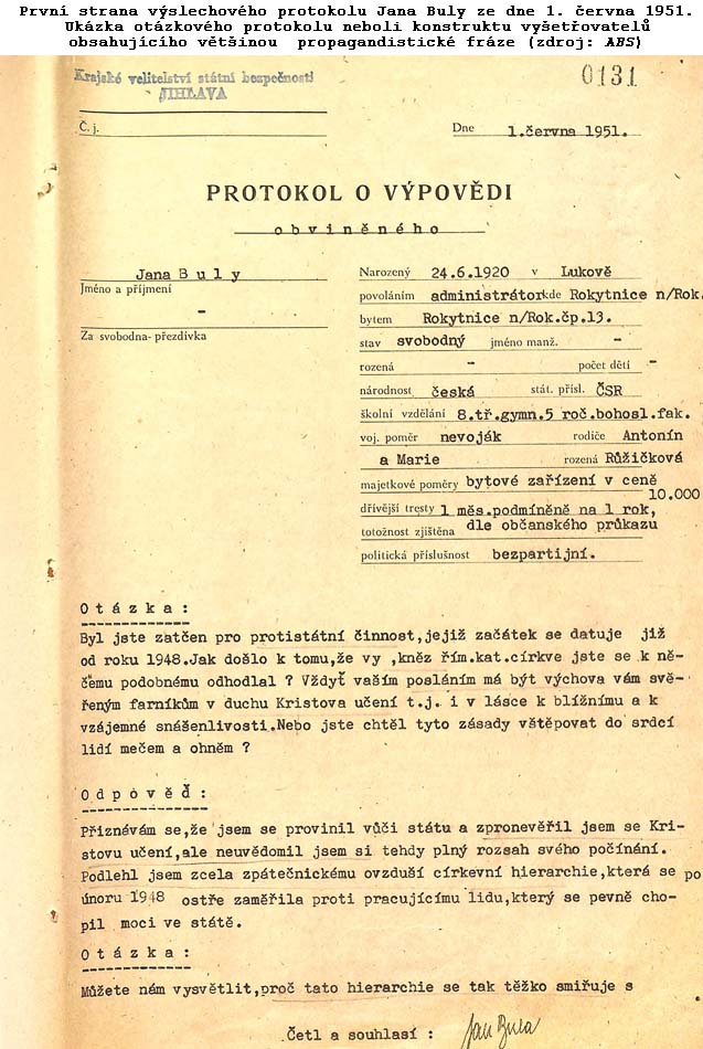 Verhörprotokoll der Staatspolizei in Jihlava mit dem später hingerichteten Jan Bula